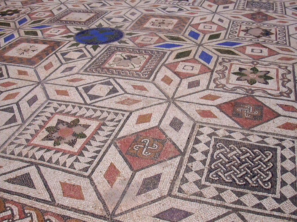 Mosaico romano de Clunia